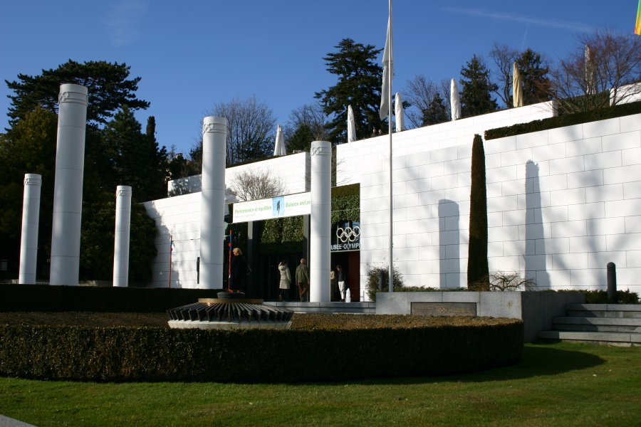 Entrée du musée Olympique à Lausanne